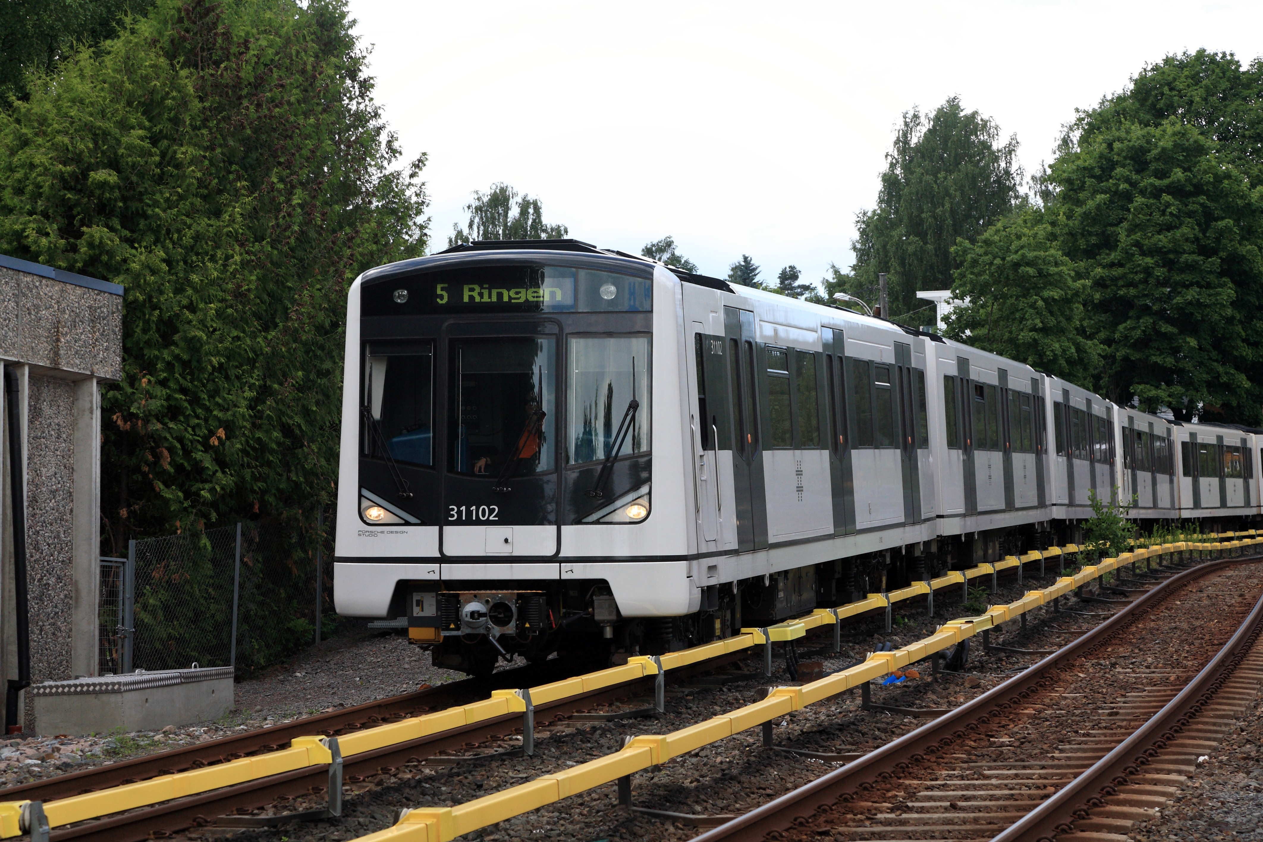 Zug der Linie 5, wegen Bauarbeiten nicht nach Ellingsrudåsen, sondern zum Ring.